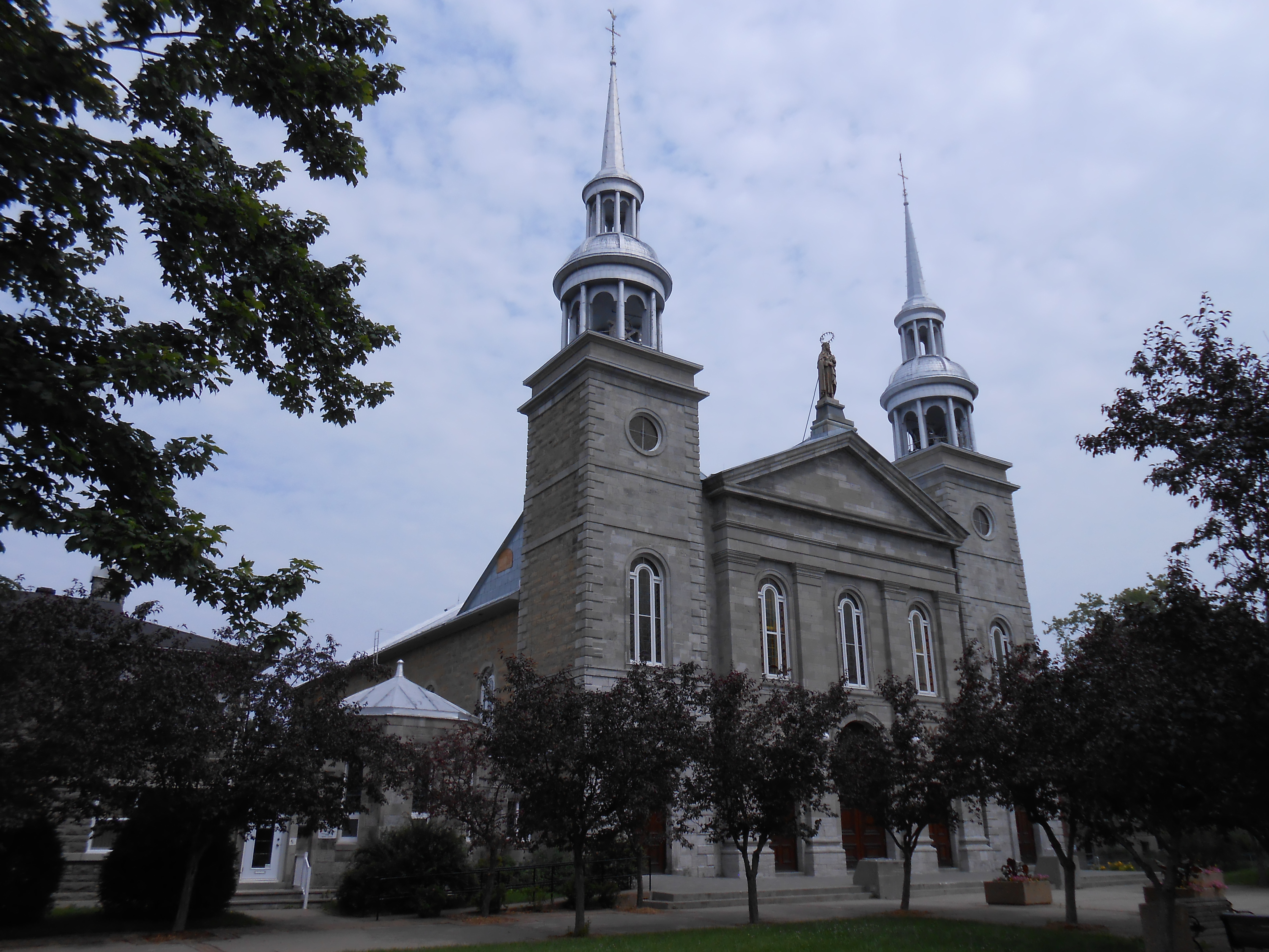 L'église de Sainte-Rose-de-Lima, 219, boulevard Sainte-Rose, Laval, reconnue monument historique par le gouvernement du Québec, est un lieu de culte catholique construit de 1852 à 1856.